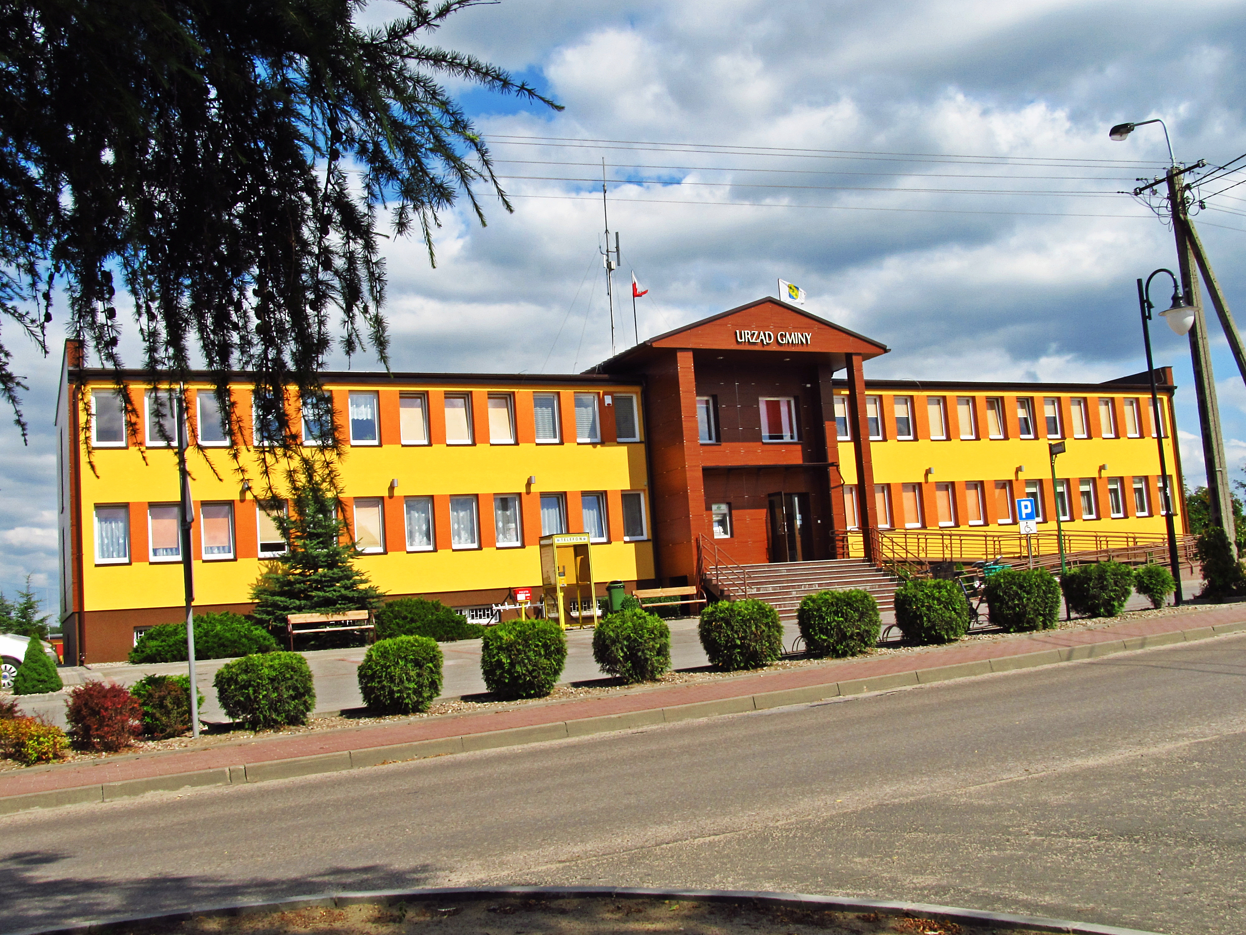 Sylwetka budynku Urzędu Gminy w Kaliskach po dokonanej w 2013 roku modernizacji